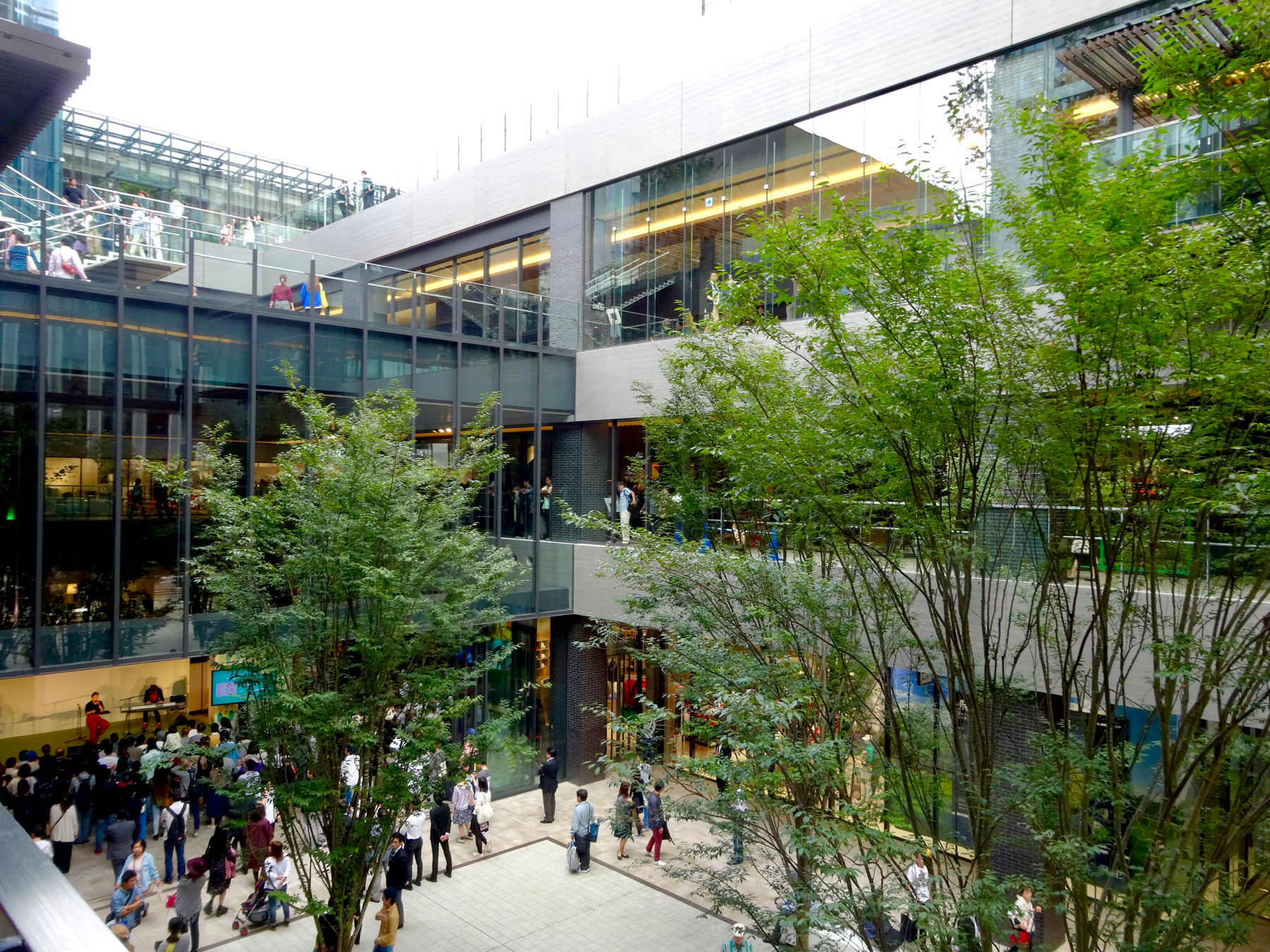 名古屋市の「ささしまライブ24」地区にあるグローバルゲートの商業施設。